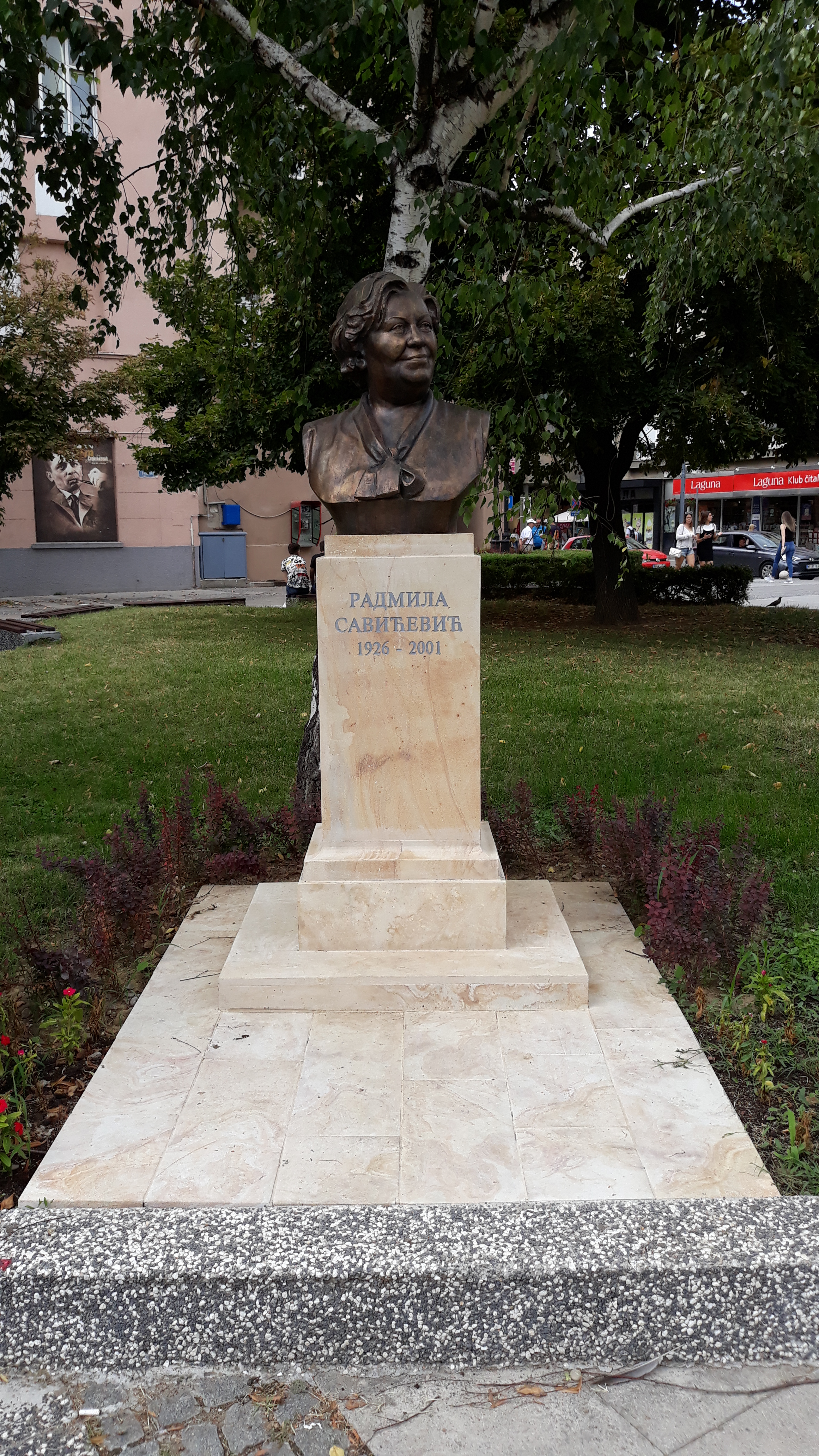 Биста Радмили Савићевић испред зграде Културног центра у Крушевцу